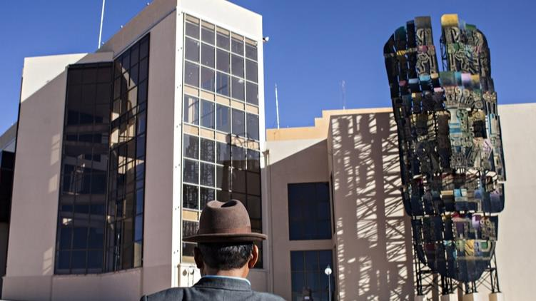 Museo mas grande de Bolivia